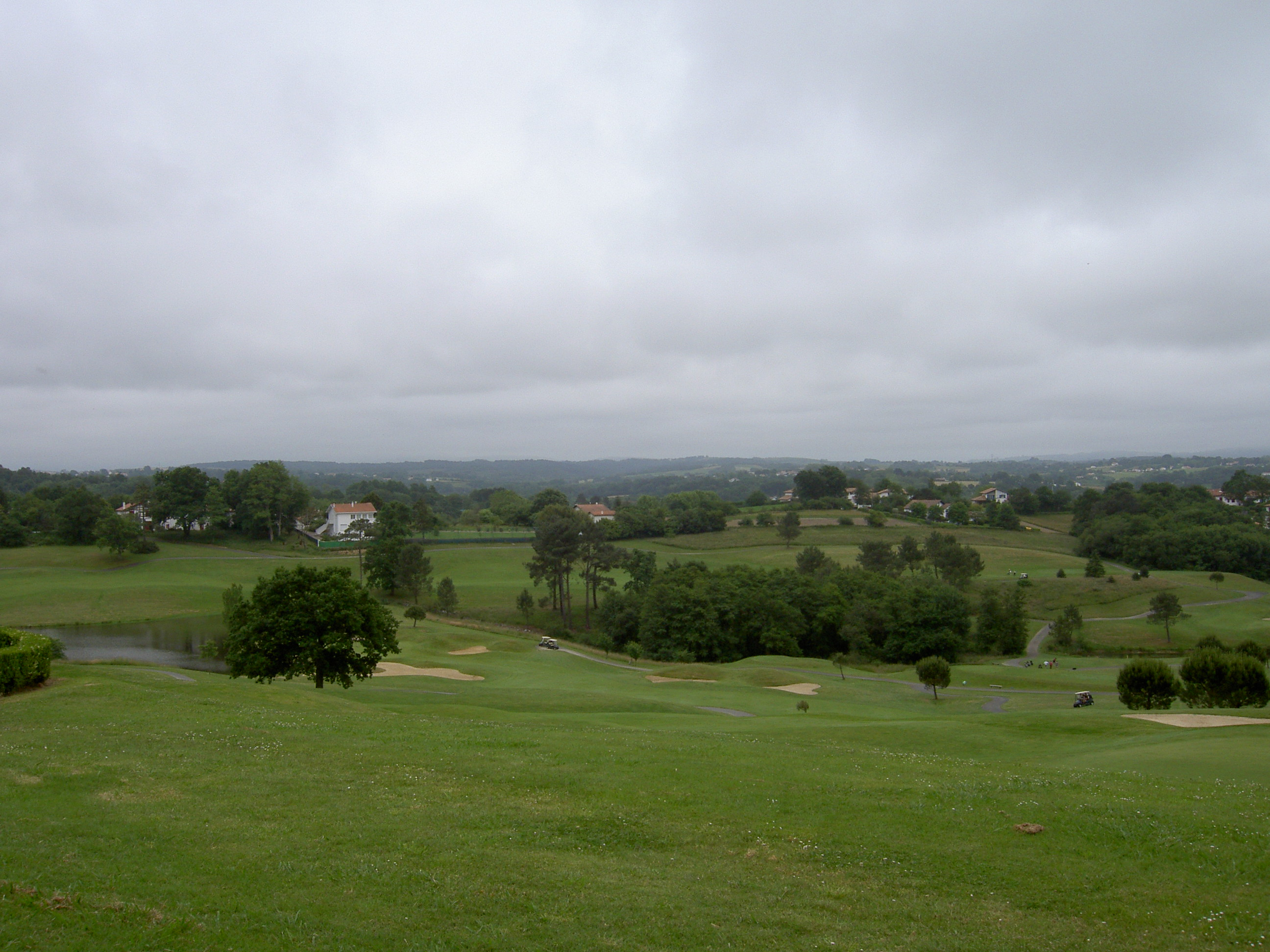 Photographie du golf du village français d'Arcangues.